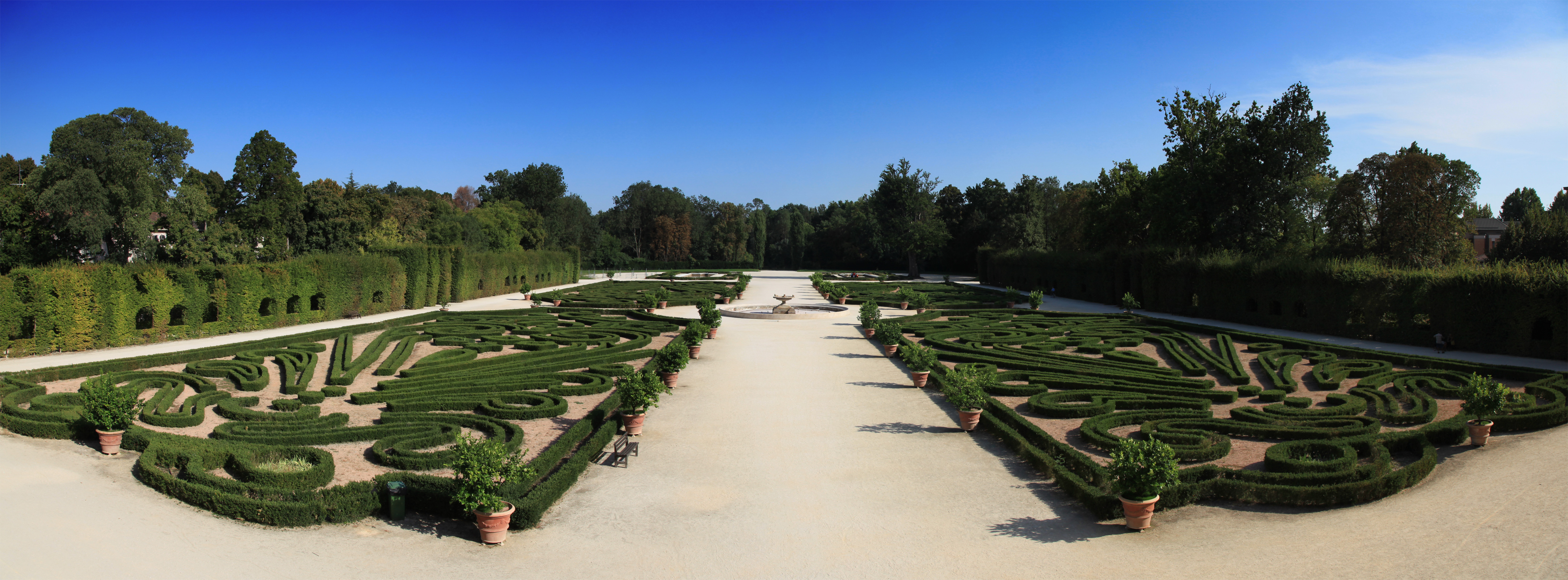 Reggia di Colorno e Giardino monumentale This is a photo of a monument which is part of cultural heritage of Italy.